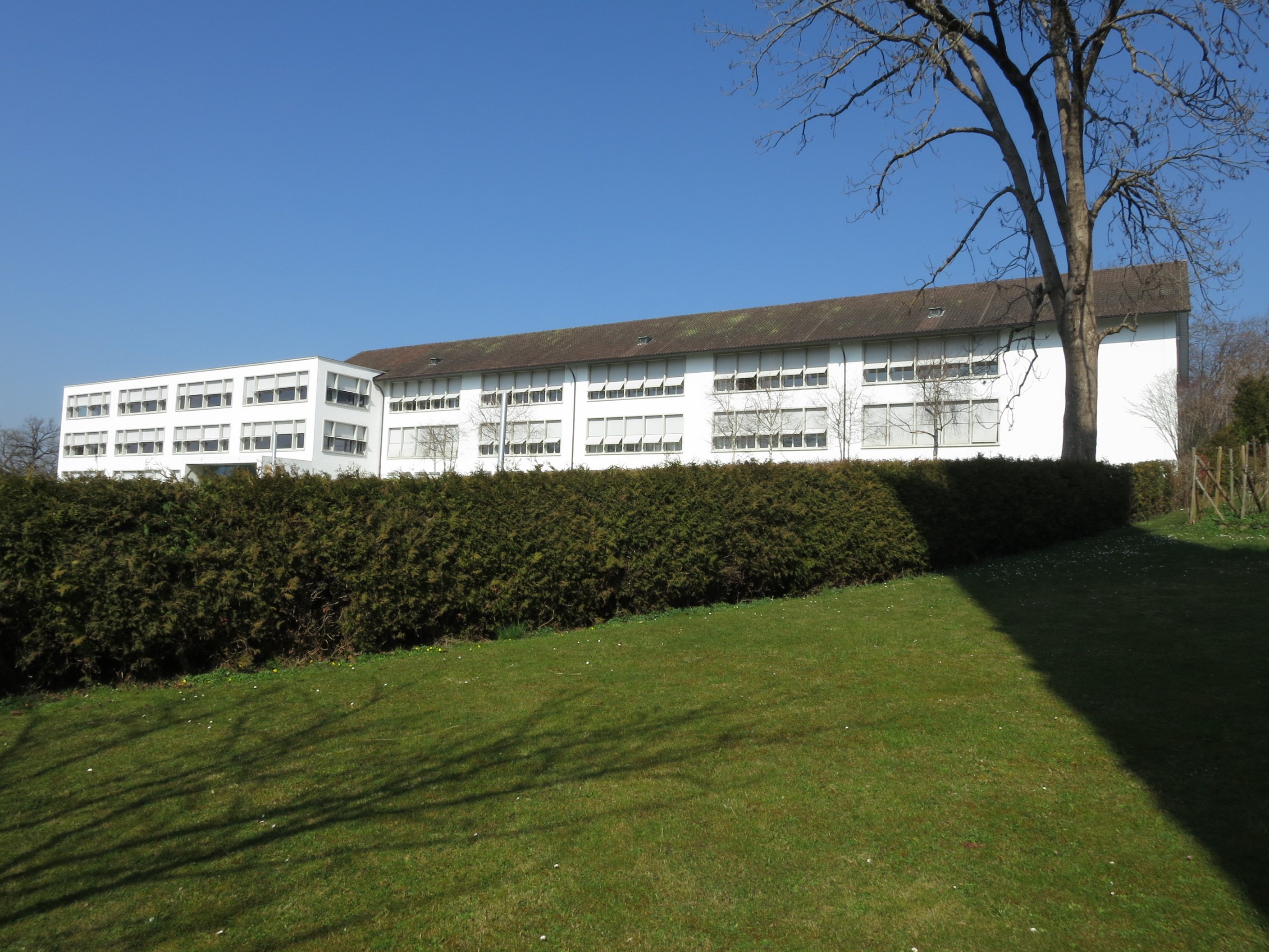 Schulhaus, Männedorf ZH, Schweiz